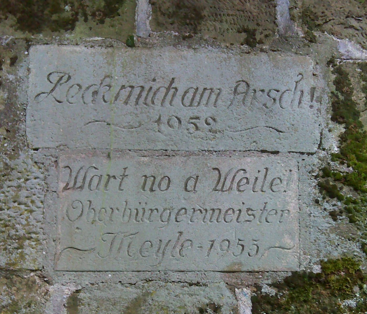 Meyle-Zitat an der Wartbergsteige in Heilbronn. Erklärung